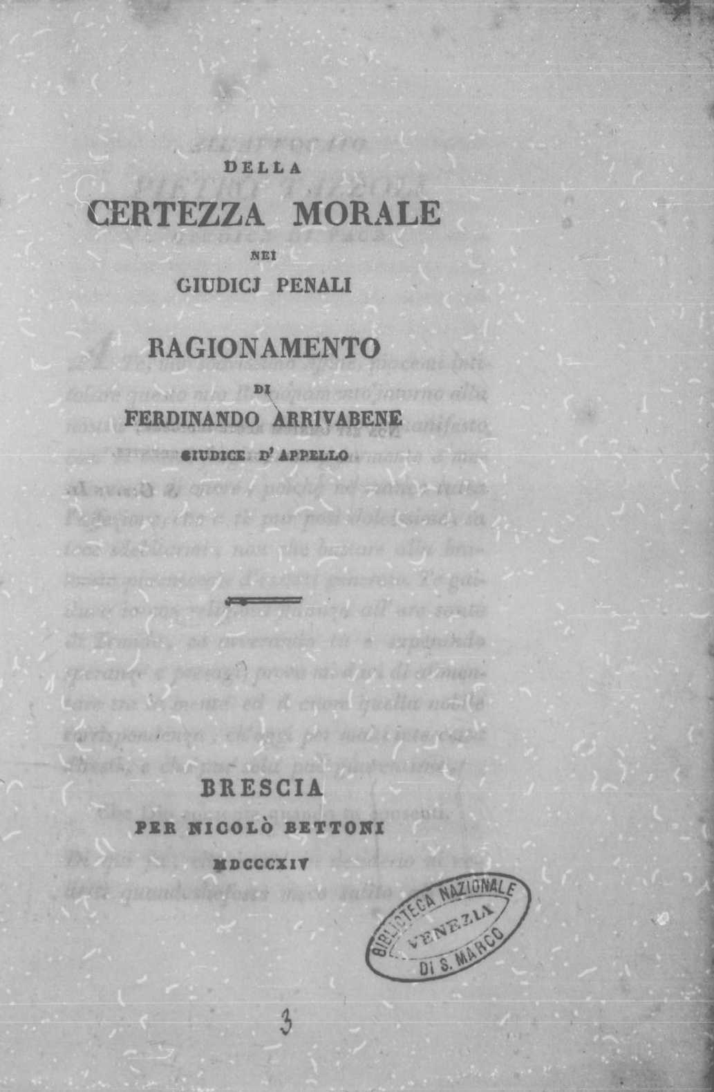 Frontespizio